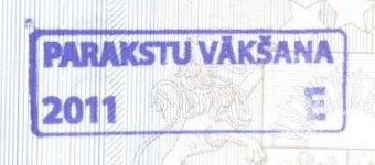 Zīmogs pasē par parakstu par krievu valodu kā otru valsts valodu.